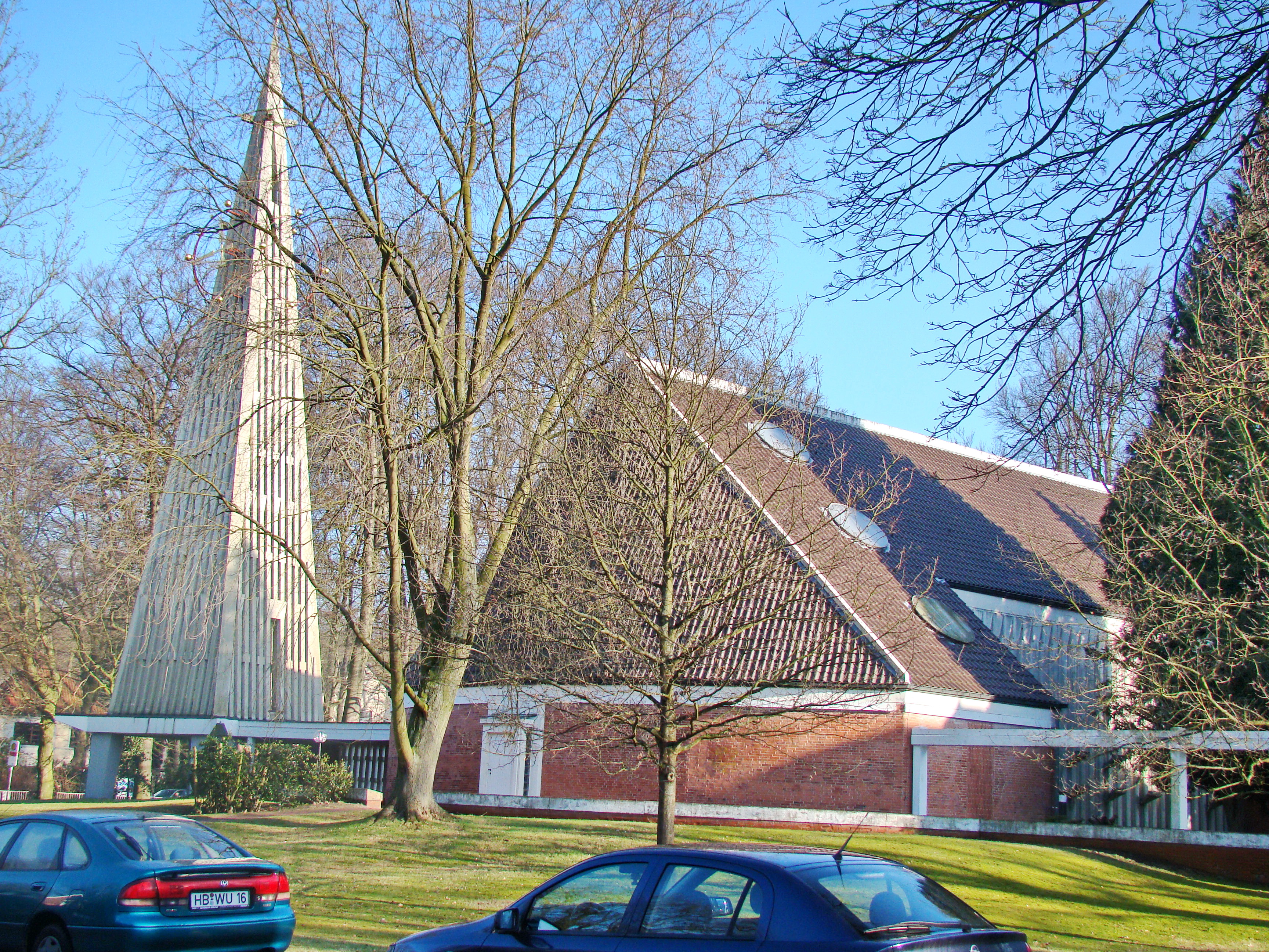 Ev.-luth. Kirche St. Magni in Bremen-Nord von Architekt Eberhard Gildemeister, erbaut 1967. Das abgebildete Objekt ist ein geschütztes Kulturdenkmal in der Freien Hansestadt Bremen, mit der Nr. 1702 beim Landesamt für Denkmalpflege registriert.